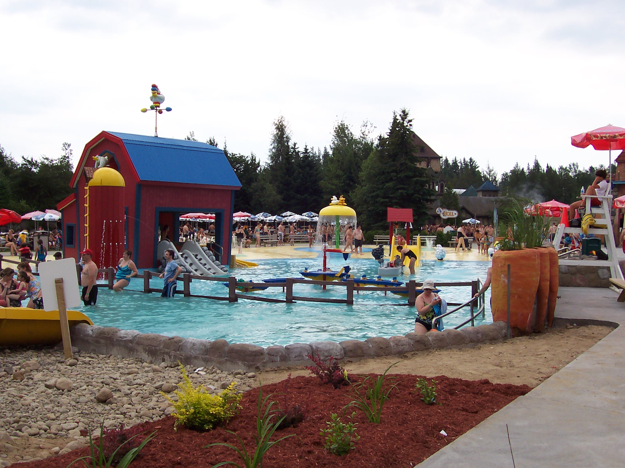 Village Vacances Valcartier, Quebec, Canada - Ferme cocorico / Cocorico farm